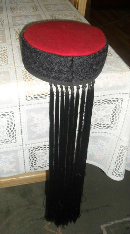 Личка капа